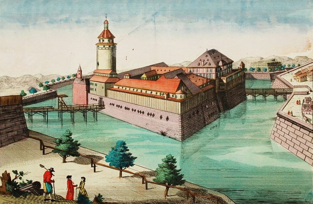 Hauer, Daniel Adam: Das Schloß oder Castell zu Leipzig, die Pleißenburg genannt (um 1780). Kupferstich (29 x 40,3 cm Plattenrand), Guckkastenblatt - deshalb seitenverkehrt!. Druck auf stellenweise knittrigem Bütten, die Farben frisch, altkoloriert. Gestochen von Daniel Adam Hauer nach einer Vorlage von Samuel Blättner. Blättner: Sächsische Malerfamilie. Samuel Blättner (1704 -1762) lernte in der Schweiz (Schüler von Joh. Rud. Daellikers), ging dann nach Dresden, später nach Leipzig und schließlich nach Altenburg, wo er Hofmaler wurde. Er war Historienmaler und hat sich auch mit Architektur beschäftigt (THIEME-BECKER Bd. 4, S. 82). - Daniel Adam Hauer, Schrift-, Landkarten- und Kupferstecher in Nürnberg (geb. 1734; lebte noch 1789; THIEME-BECKER Bd. 16, S. 126).